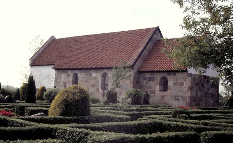 Helstrup Kirke, set fra sydøst; randers Kommune, Denmark